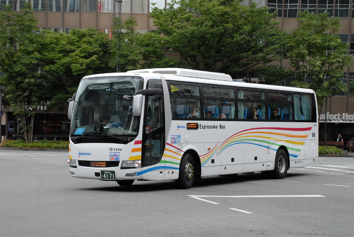 博多駅前にて、2019-7-13 撮影